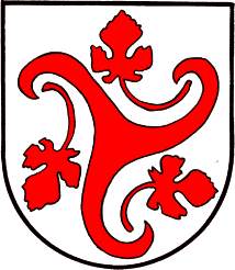 Wappen der Gemeinde Weinitzen in Österreich